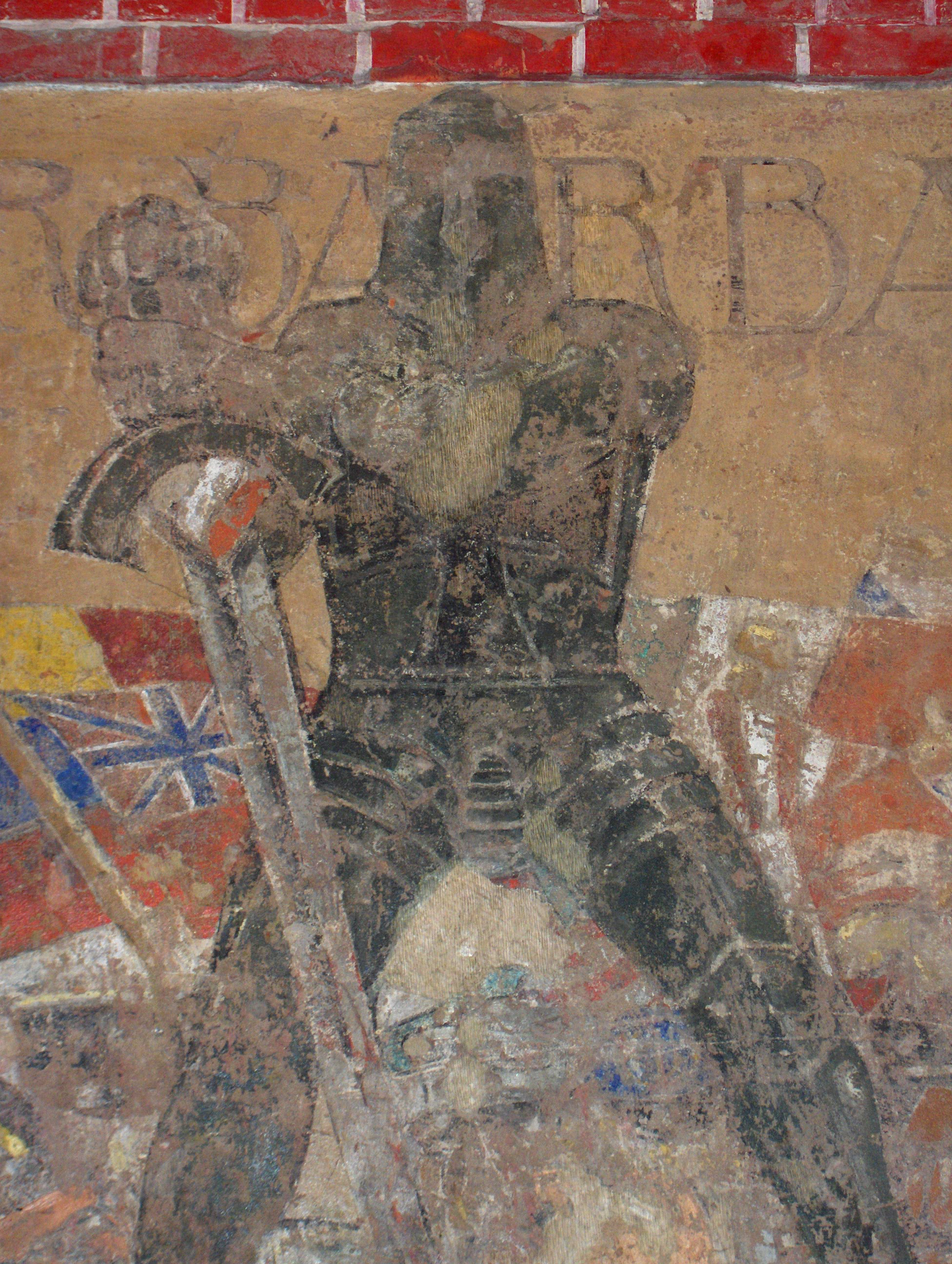 Der Barbar; wall painting by H.-O. Pieper (WWI), Fort Napoleon, Oostende, Belgium